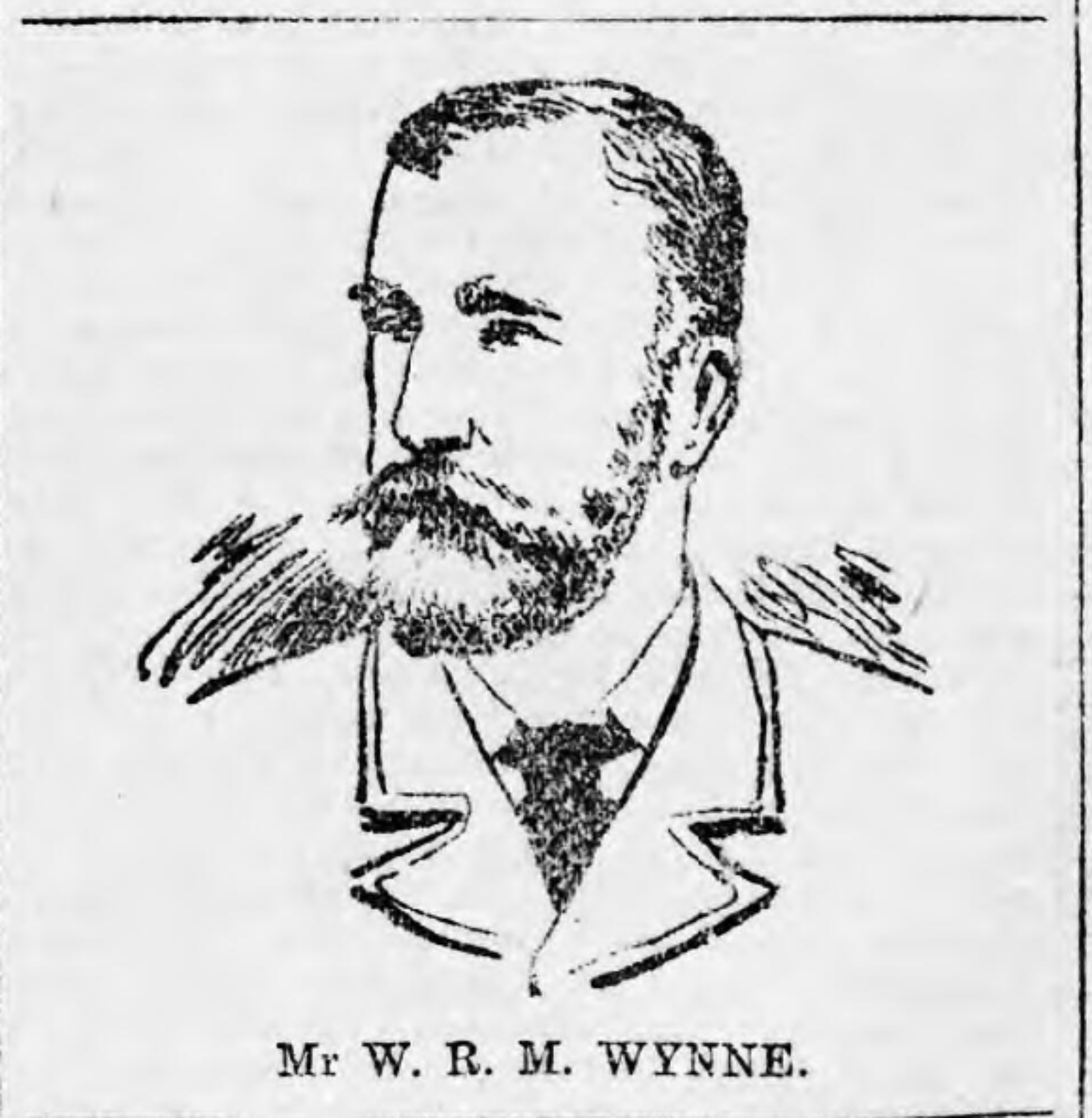 William Robert Maurice Wynne, Peniarth